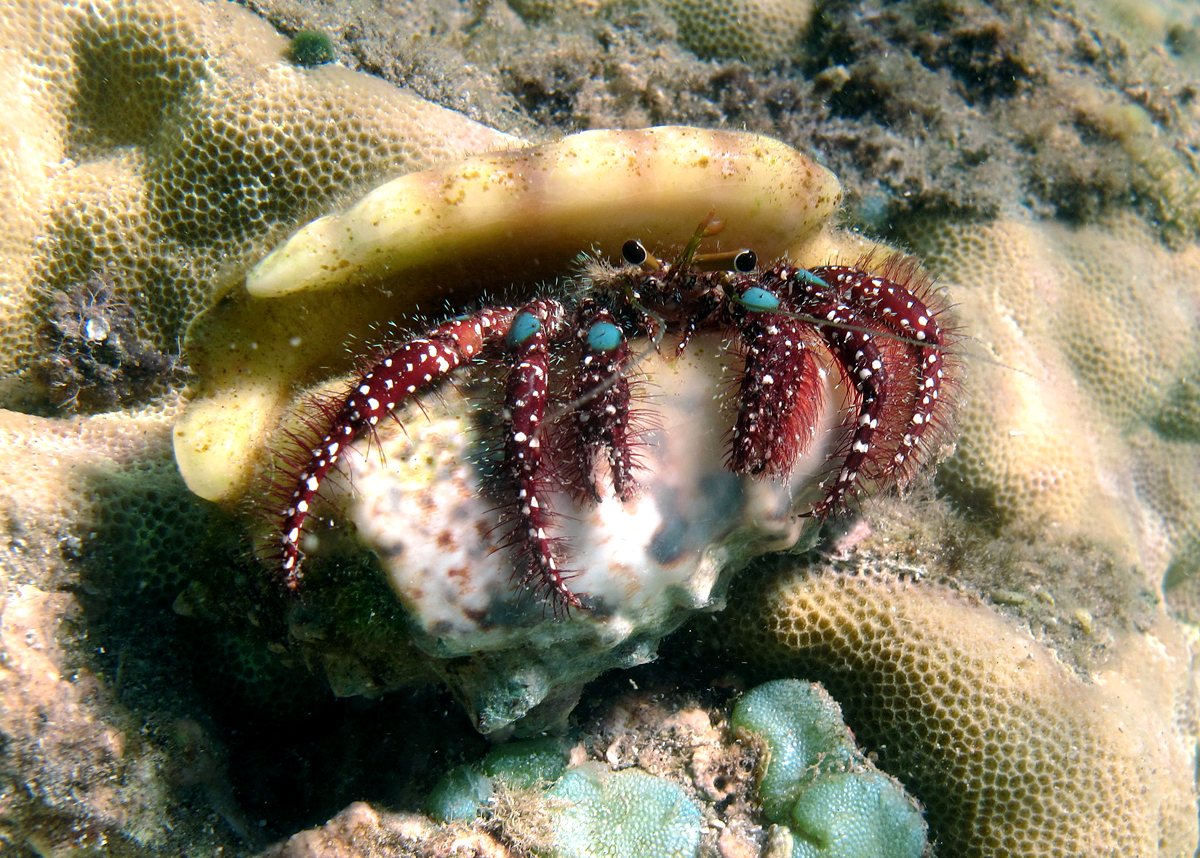 Le Bernard l'ermite à taches bleues Dardanus guttatus à la Réunion (dans une coquille de Lentigo lentiginosus).